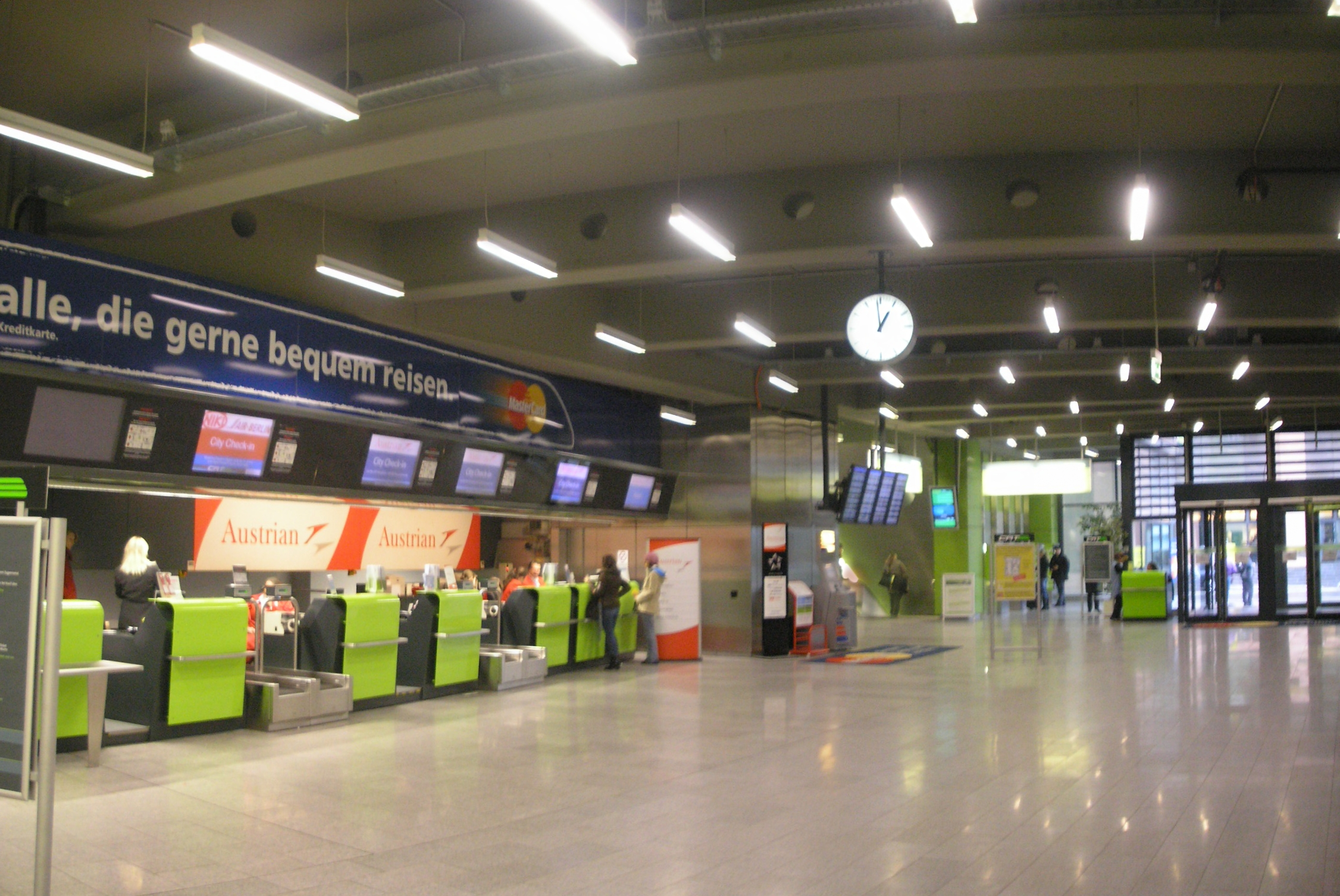 CAT Terminal in Bahnhof Wien Mitte